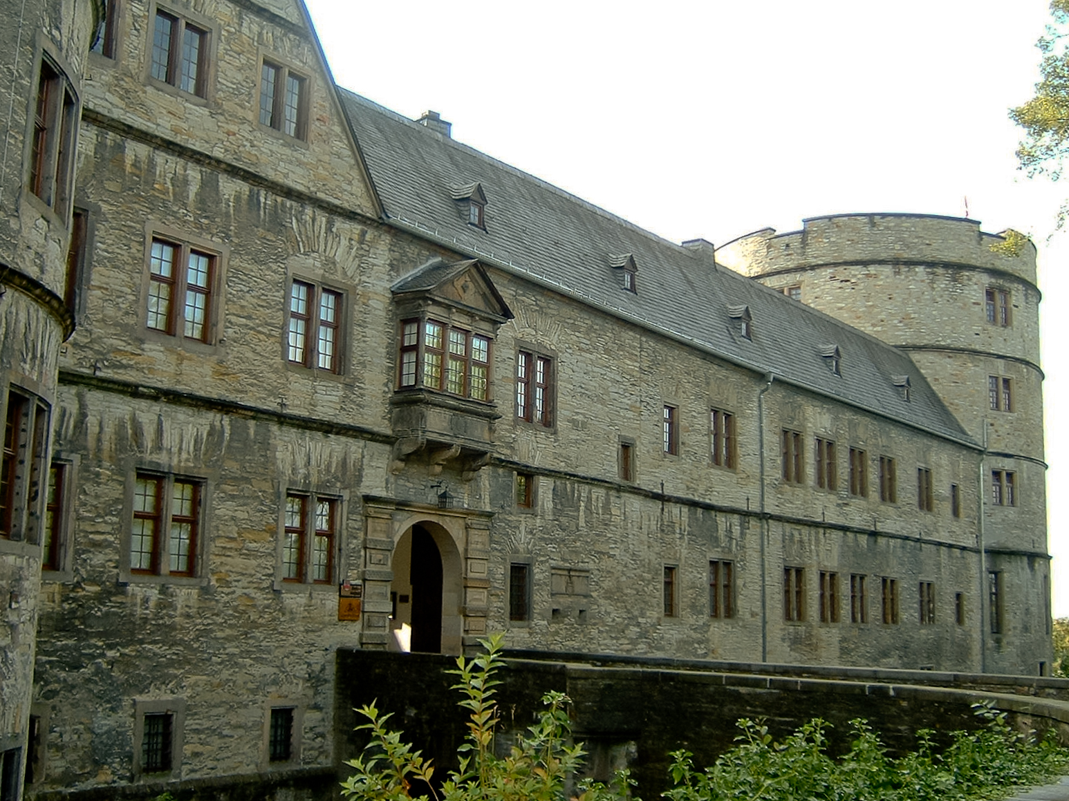 Ostflügel der Wewelsburg bei Büren, links ist noch ein Teil des Südostturmes zu sehen, rechts auf der Nordecke der Burg befindliche Hauptturm